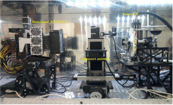 Photographie du micro-tomodensitomètre PIXSCAN II, Carine KRONLAND-MARTINET, CPPM, AIx Marseille Université